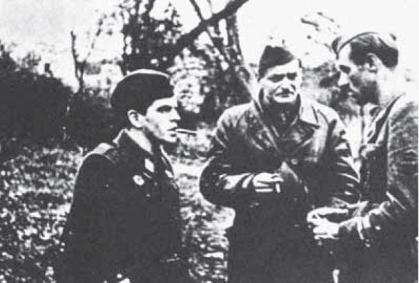 Franc Rozman-Stane in Boris Kidrič v razgovoru s partizanskim komandantom.